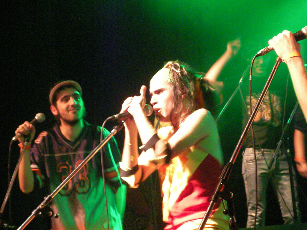 Artista de Uruguay, Dani Umpi, brindando un concierto en "La Trastienda" de Buenos Aires.